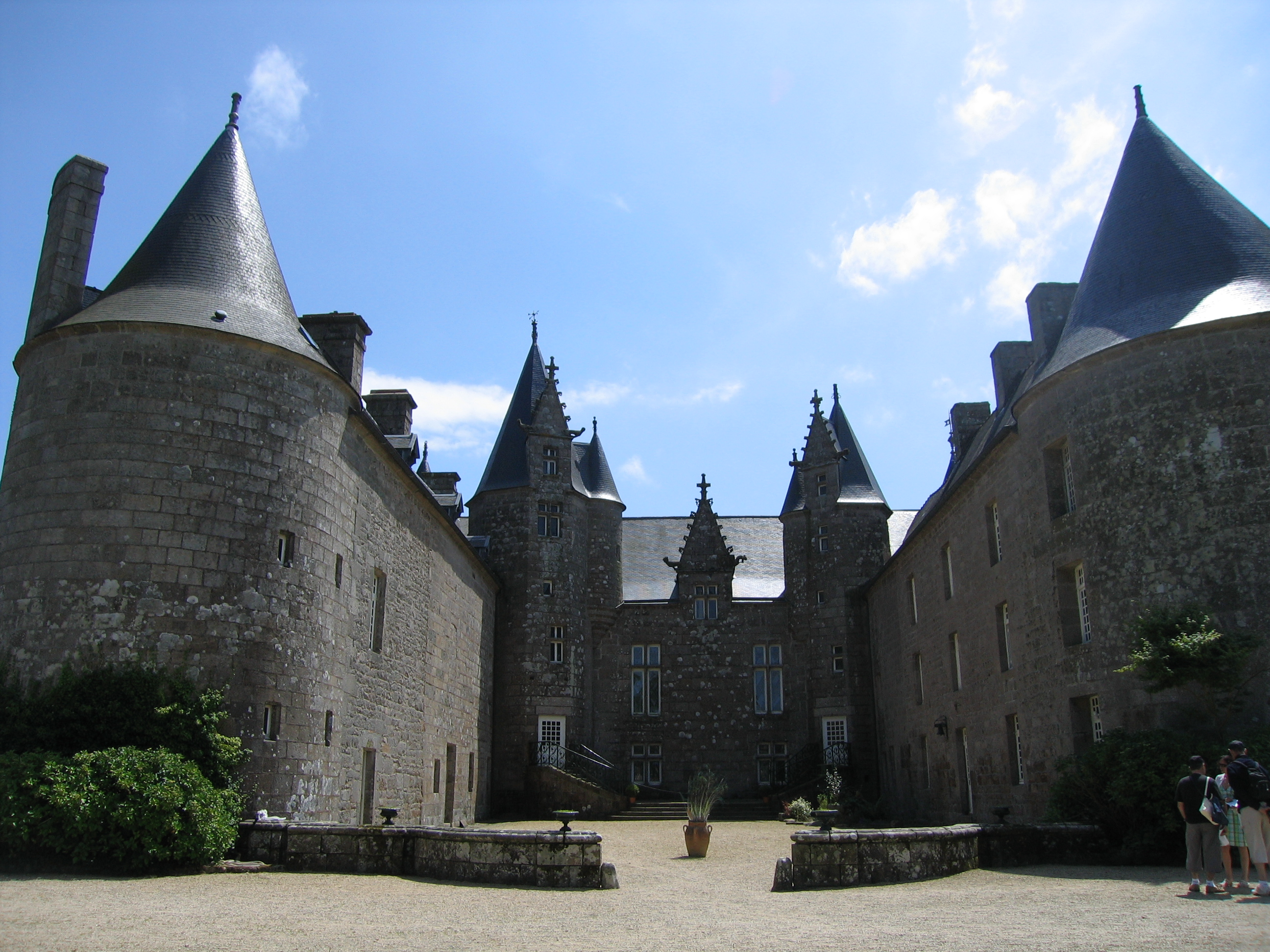 Le Château Kergrist à Ploubezre, Côtes-d'Armor